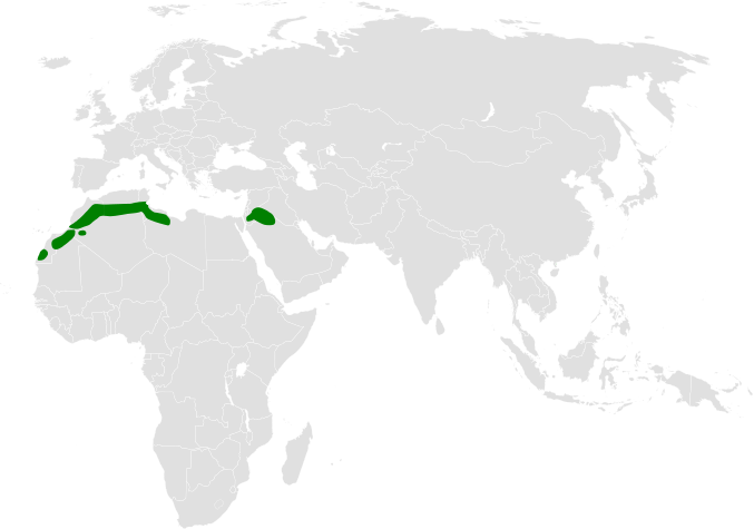 Ramphocoris clotbey distribution map, based on